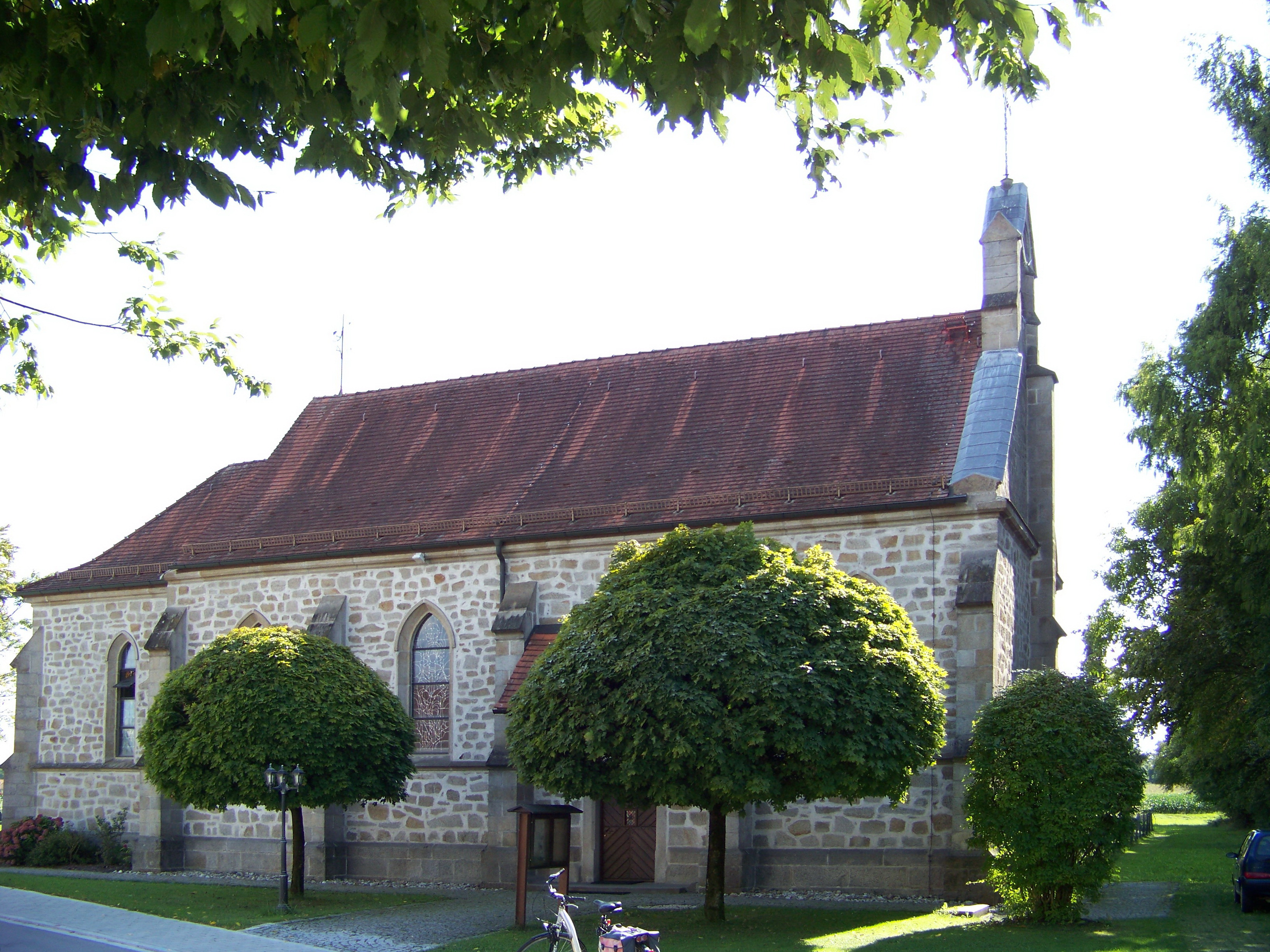 Offenberg, Aschenau, Hauptstraße 29. Katholische Kirche Herz Jesu. Neugotischer unverputzter Hausteinbau mit eingezogenem Chor und Giebelreiter, 1885; mit Ausstattung.